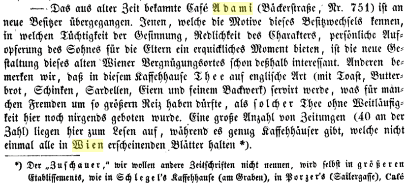 Bericht im „Wiener Zuschauer“, Zeitschrift für Gebildete, Ausgabe Nr. 5 vom 8. Jänner 1847